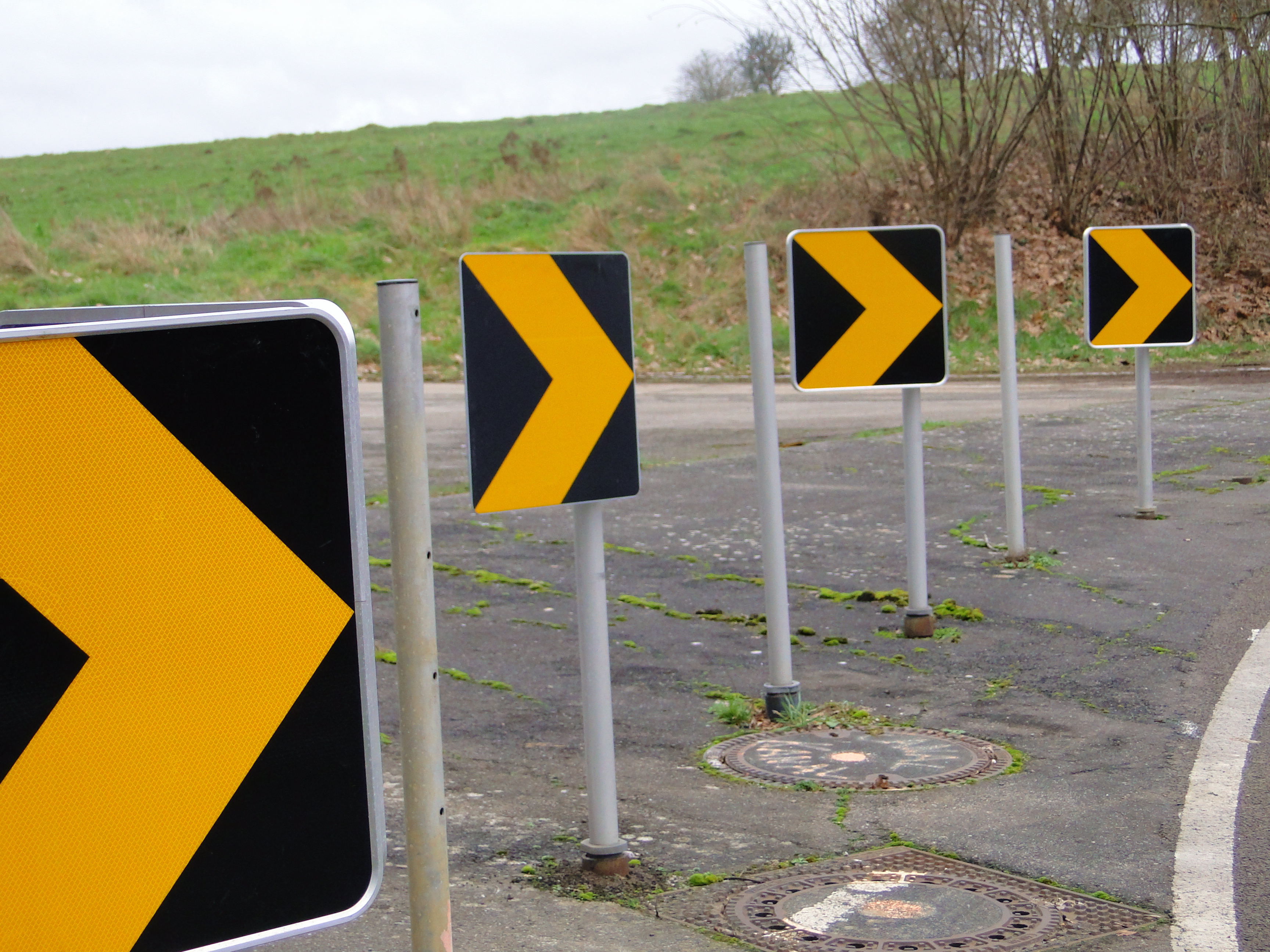 Verkéiersschëld E,24b aus dem Lëtzebuerger Code de la route